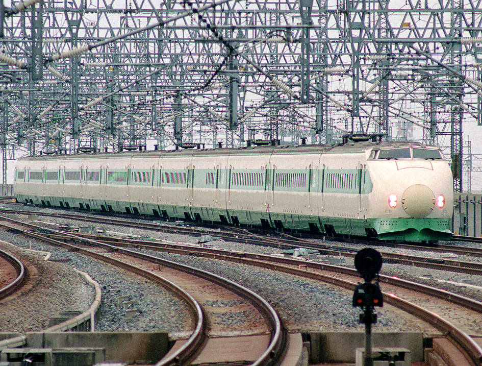 JR東日本 200系新幹線F17編成